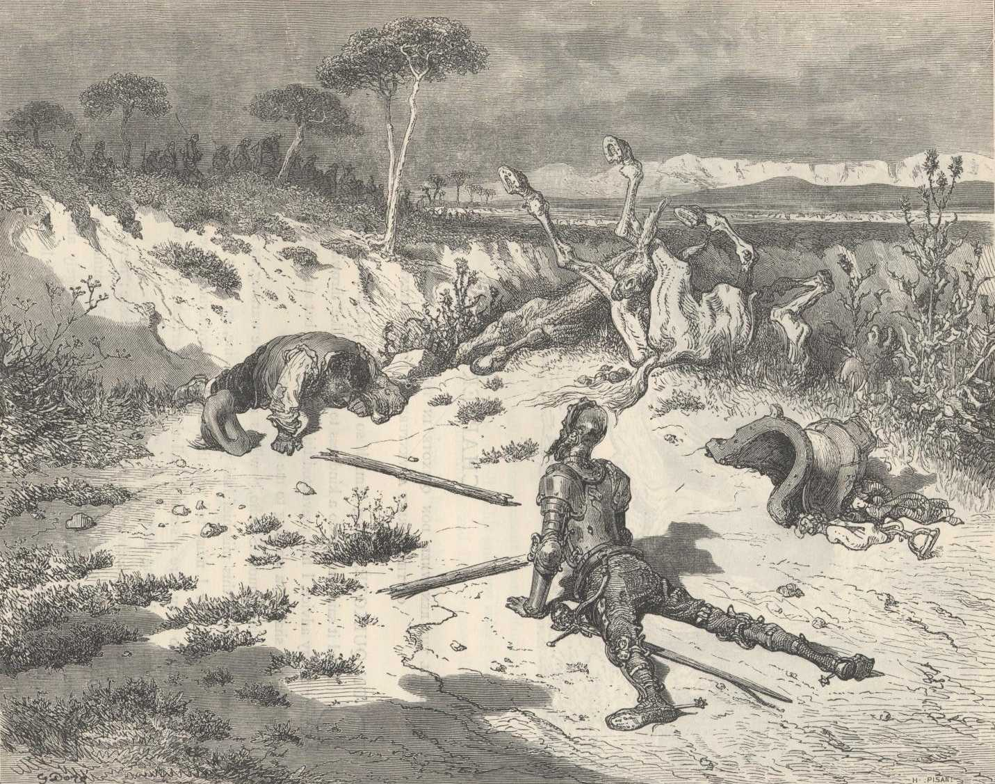 Dom Quixote e Sancho Pança destroçados